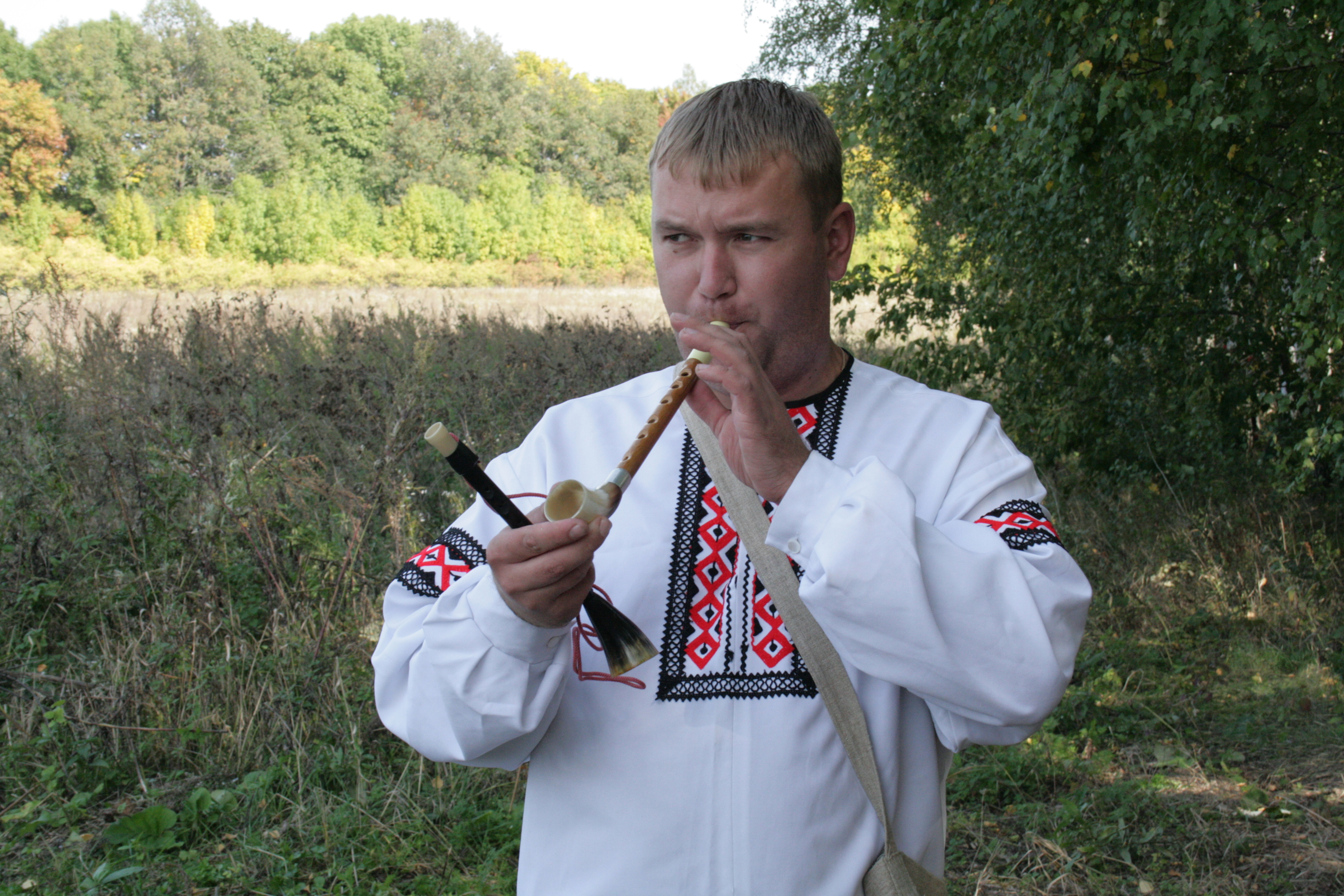 Открытие нового микрорайона родового экокопоселения «Кореньские родники». 15 сентября 2012 г. Белгородская область, Шебекинский район.